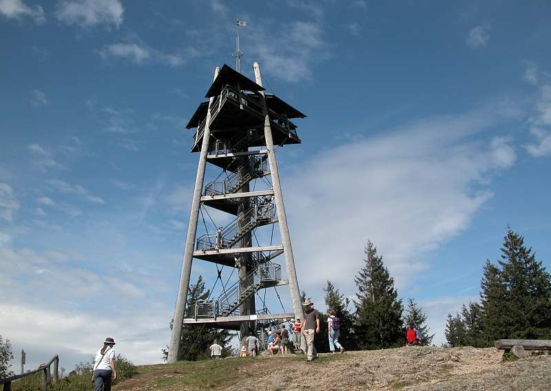 Eugen-Keidel-Turm, Schauinsland, Schwarzwald, Deutschland